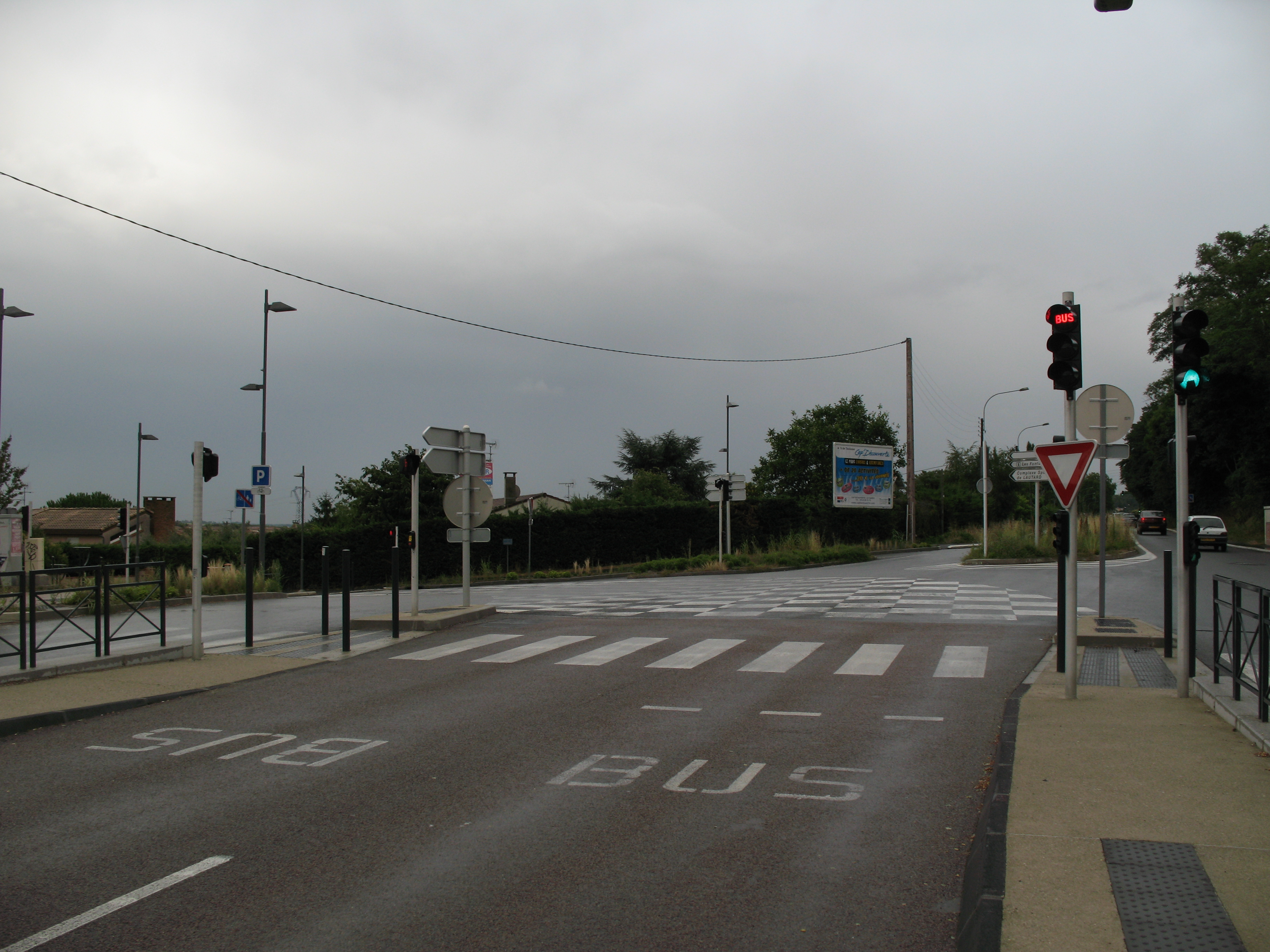 Voie en site propre pour les bus du réseau Tisséo à Ramonville-Saint-Agne (Haute-Garonne, France).